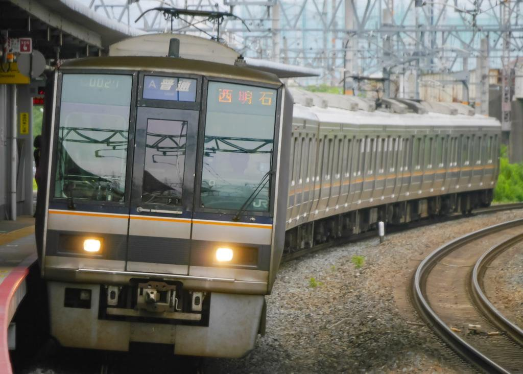 普通西明石 JR京都線桂川駅